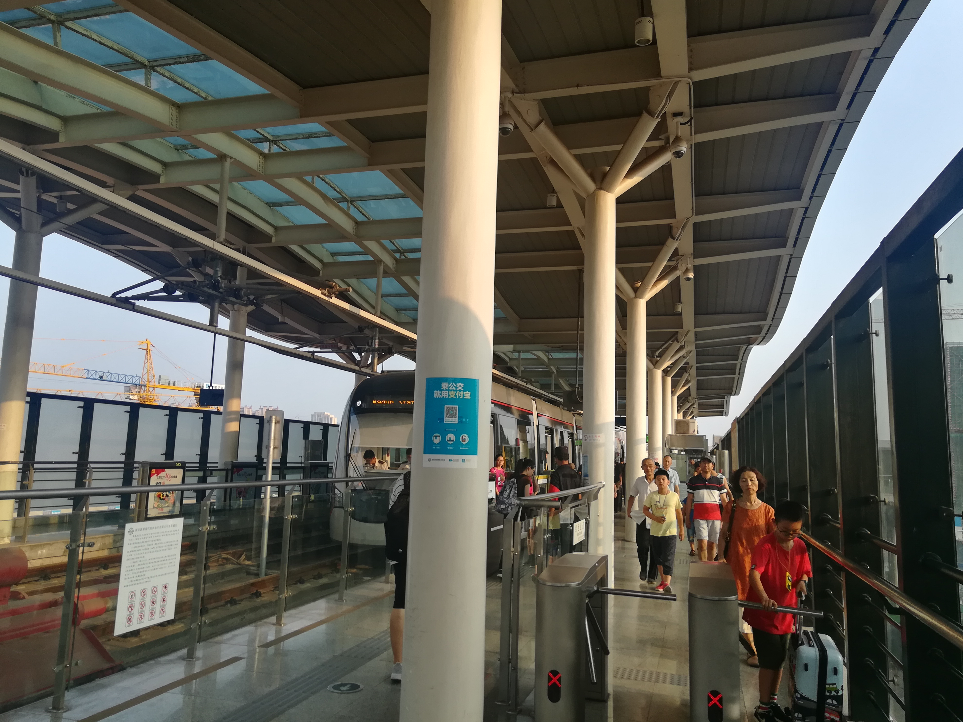 中文（中国大陆）: 马群站（有轨电车）